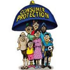 उपभोक्ता संरक्षण अधिनियम